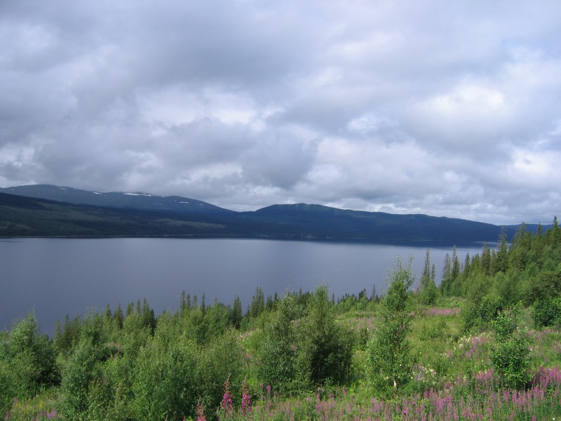 Bild des Kallsjön Sees Schweden (im Jämtland). GNU FDL.